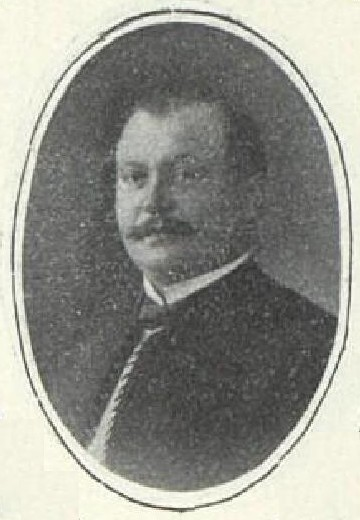 Josef Suhrada (1869-1914), rakouský a český politik